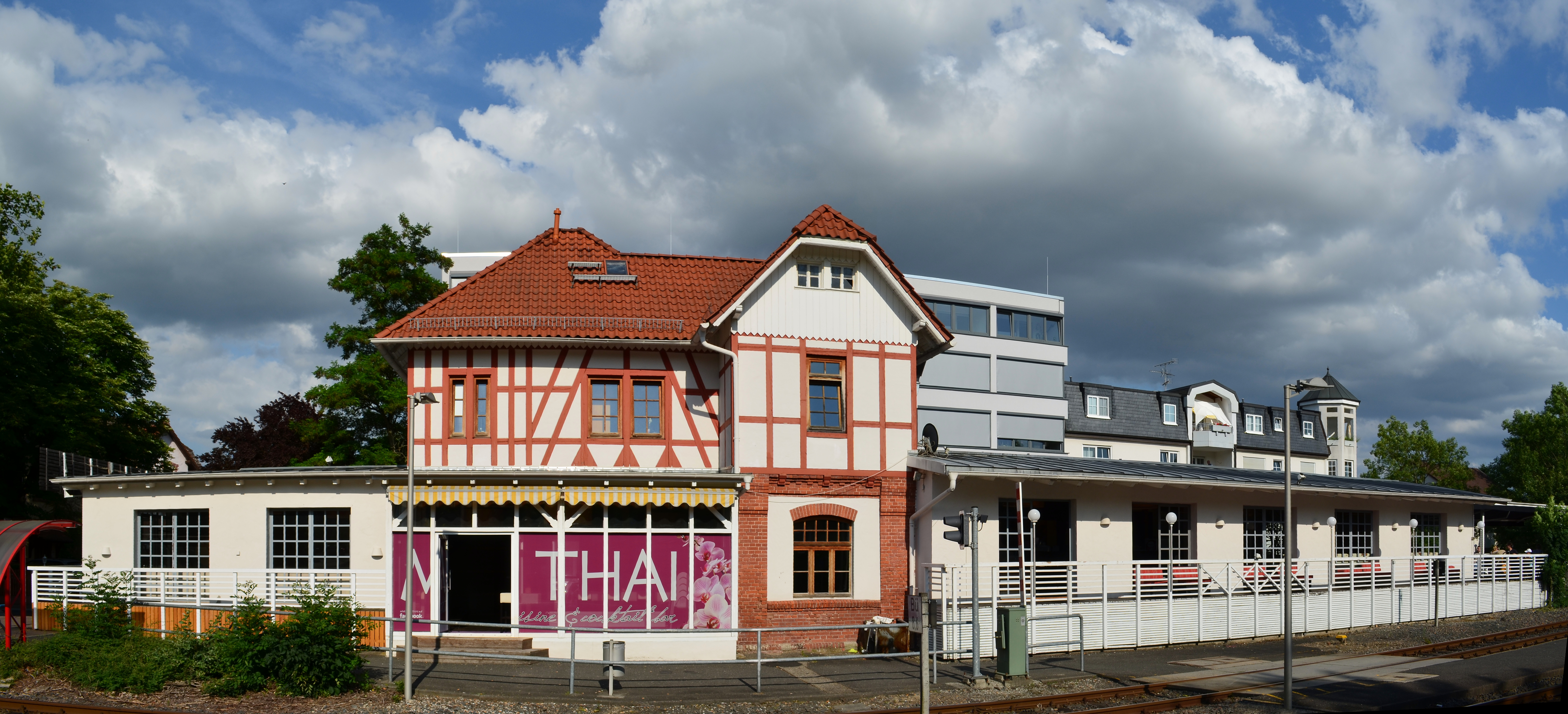 Kelkheim (Taunus), Bahnhof